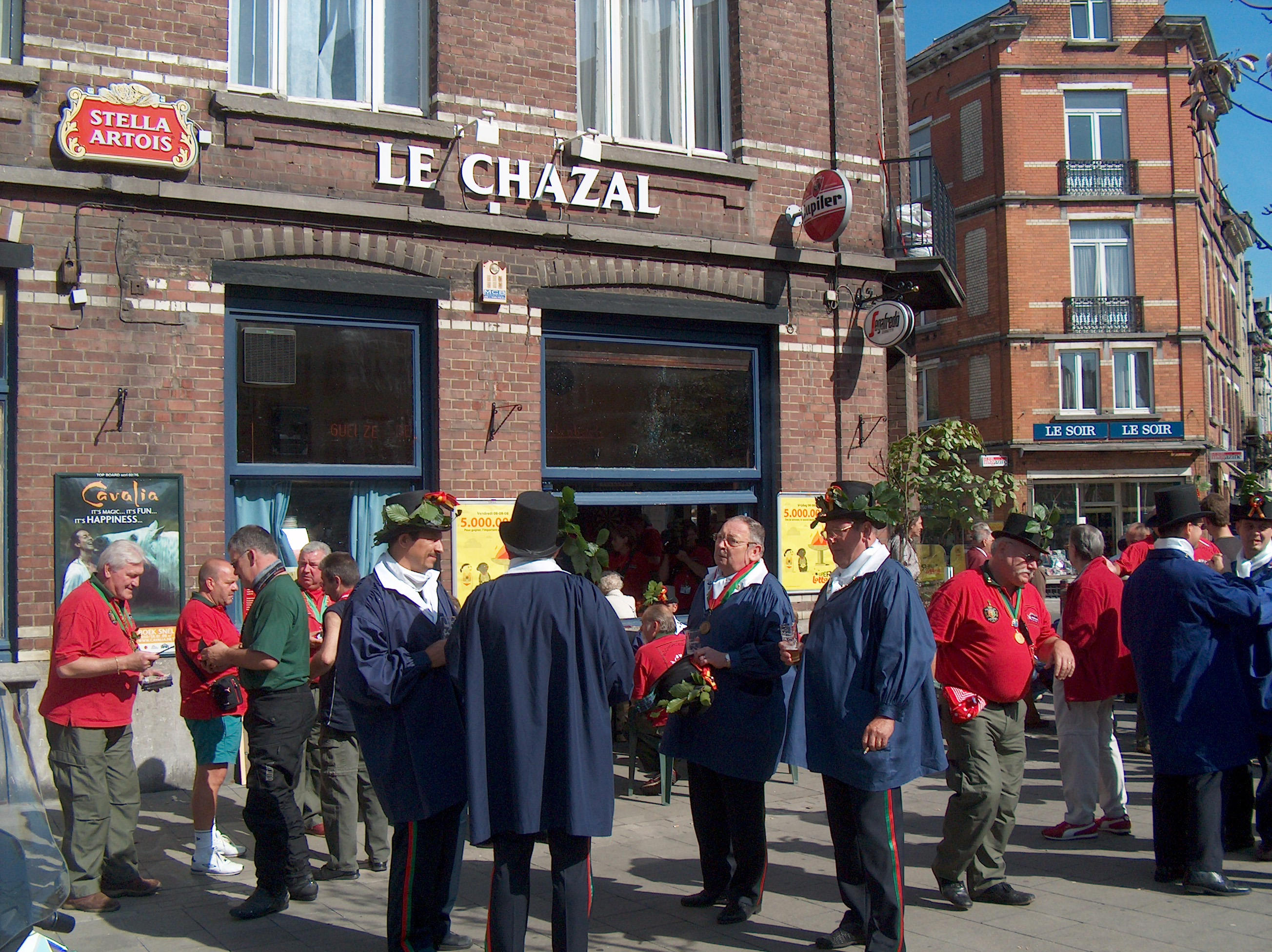 Meyboom à la rue Joseph Coosemans à Schaerbeek, Bruxelles, Belgique.